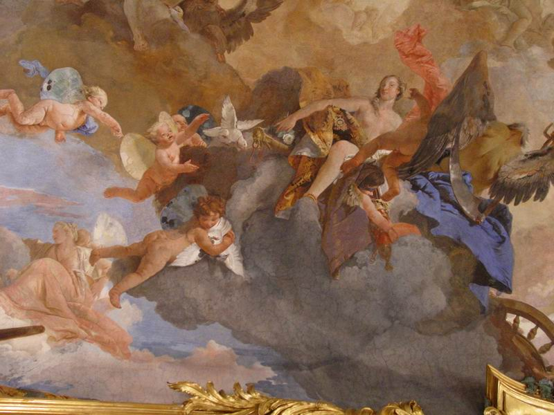 Hera, Greek goddess (detail)